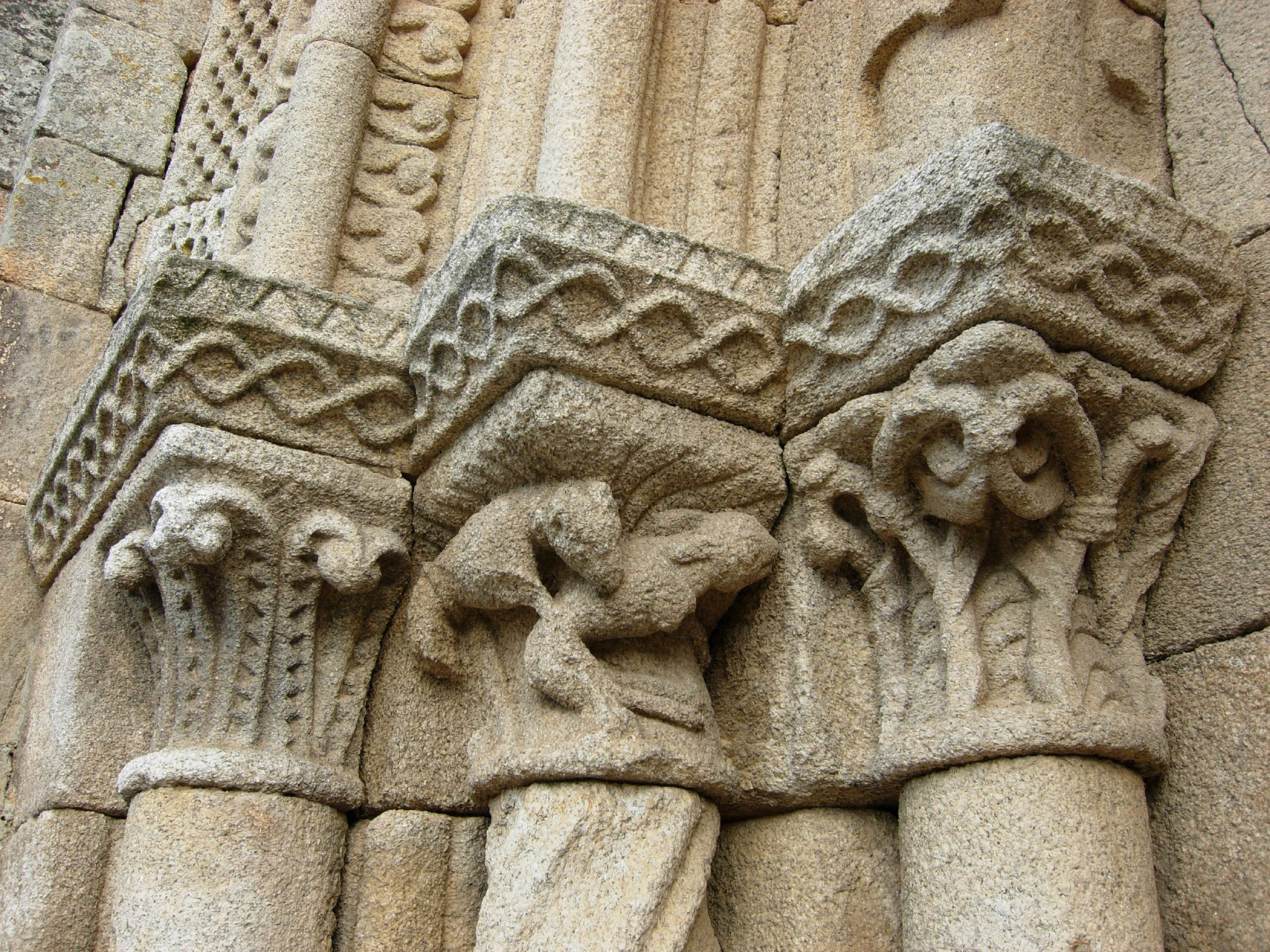 Capiteles en el lado izquierdo de la portada occidental.